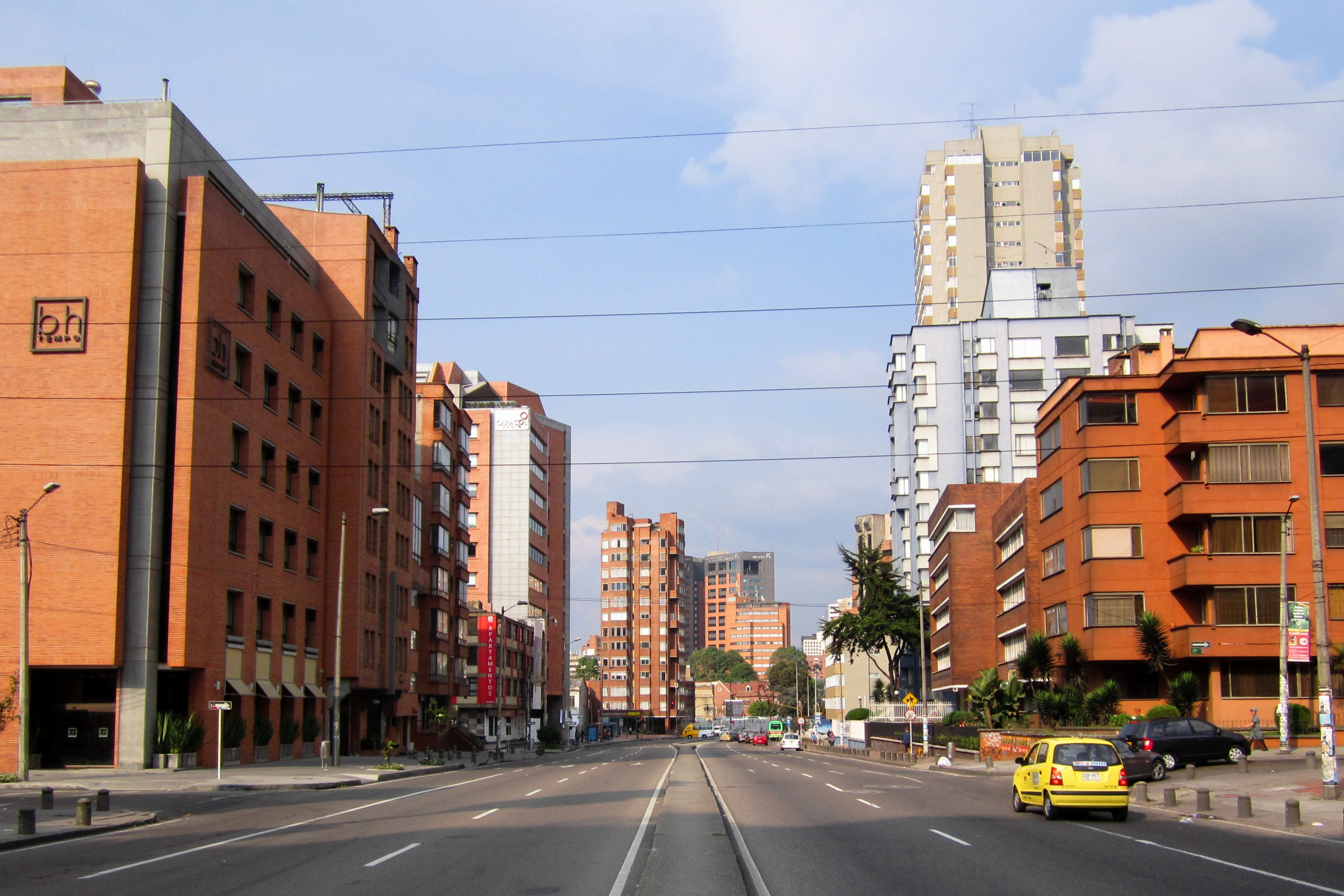 Carrera 7 calle 65, localidad de Chapinero en Bogotá. Límite entre los barrios Chapinero Norte (izquierda) y Granada (Derecha).